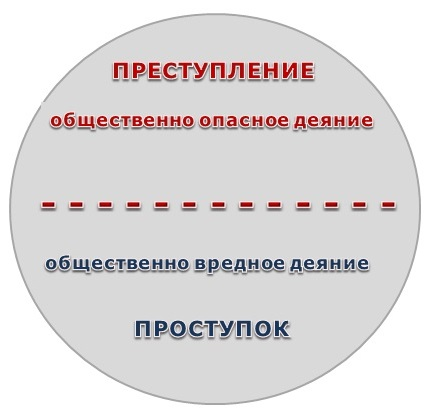 правонарушение